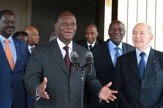 Alassane Ouattara et Michel Camdessus (d) ce vendredi au palais présidentiel d'Abidjan